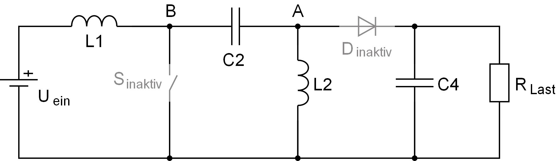 Ersatzschaltbild fuer den dritte Zeitabschnitt DCM